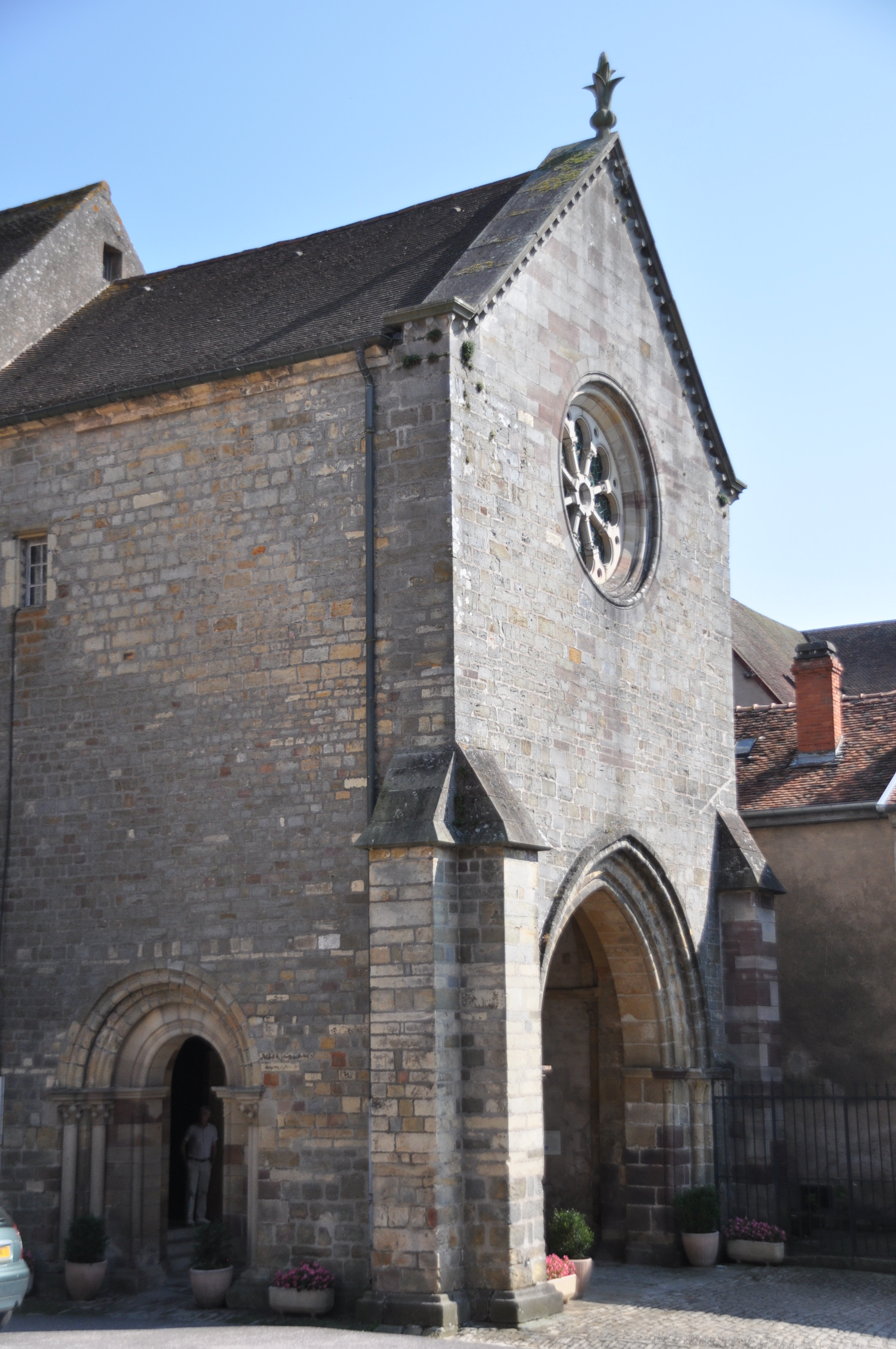 Faverney (Haute-Saône) - Abbaye .